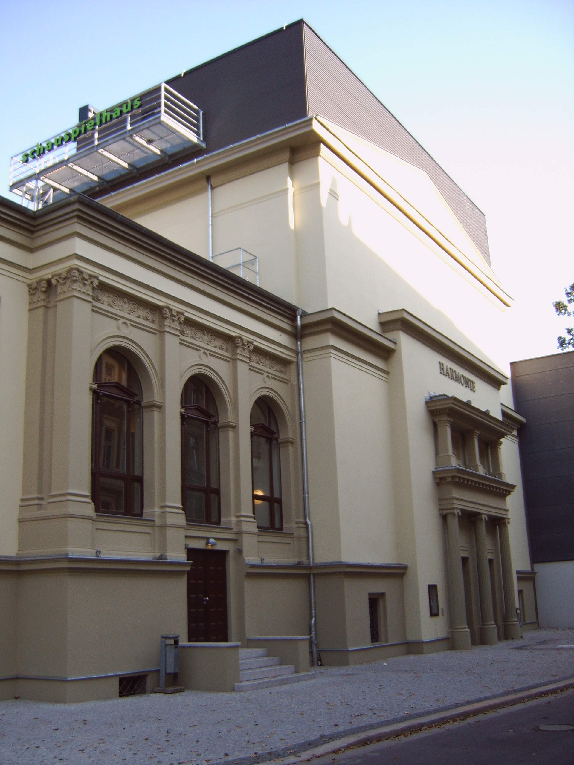 Schauspielhaus Magdeburg, Südseite, Bild aufgenommen am 12.10.2005 durch User:Olaf2